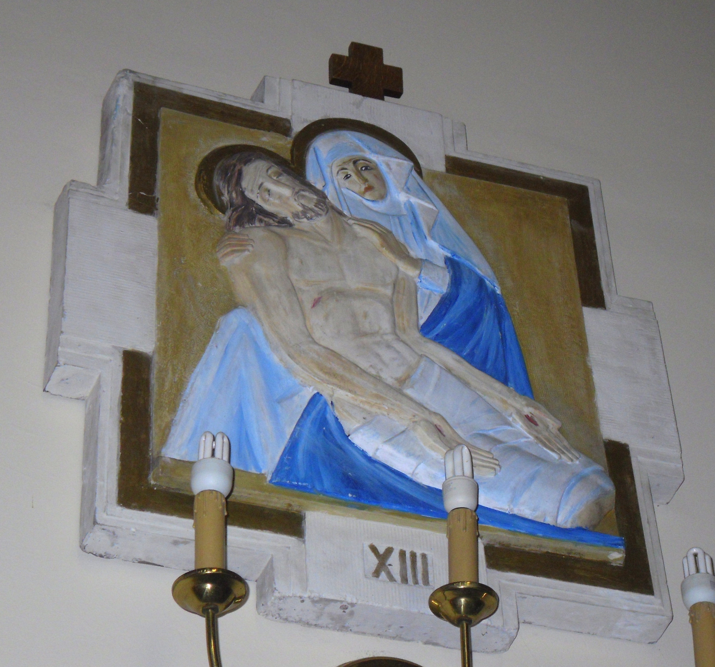 Stacja drogi krzyżowej z kościoła pw. Przemienienia Pańskiego w Garbowie autorstwa Zofii Trzcińskiej-Kamińskiej.